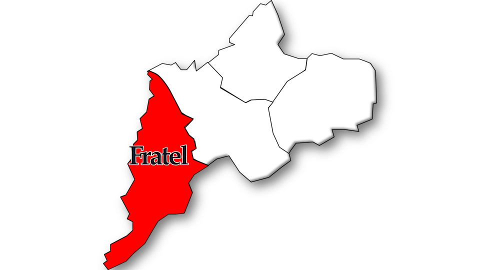 População